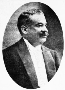 Eliodoro Villazón, presidente de Bolivia